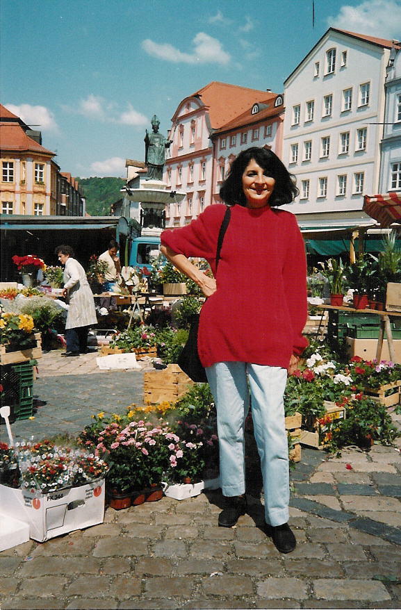 Argentinien author Tununa Mercado 1993 in Eichstaett, Germany